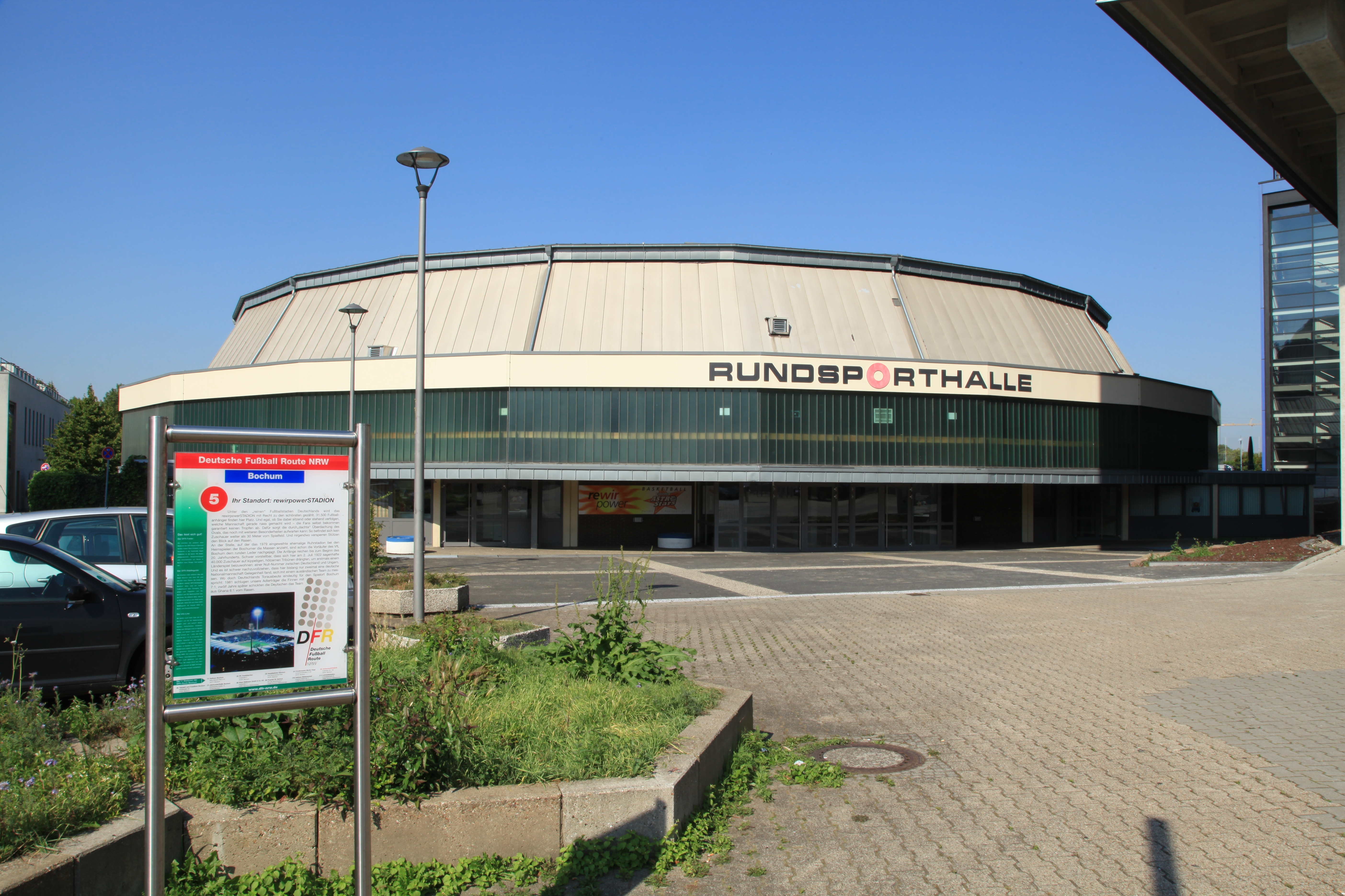 Rundsporthalle auf dem VfL-Gelände, Am Stadion in Bochum